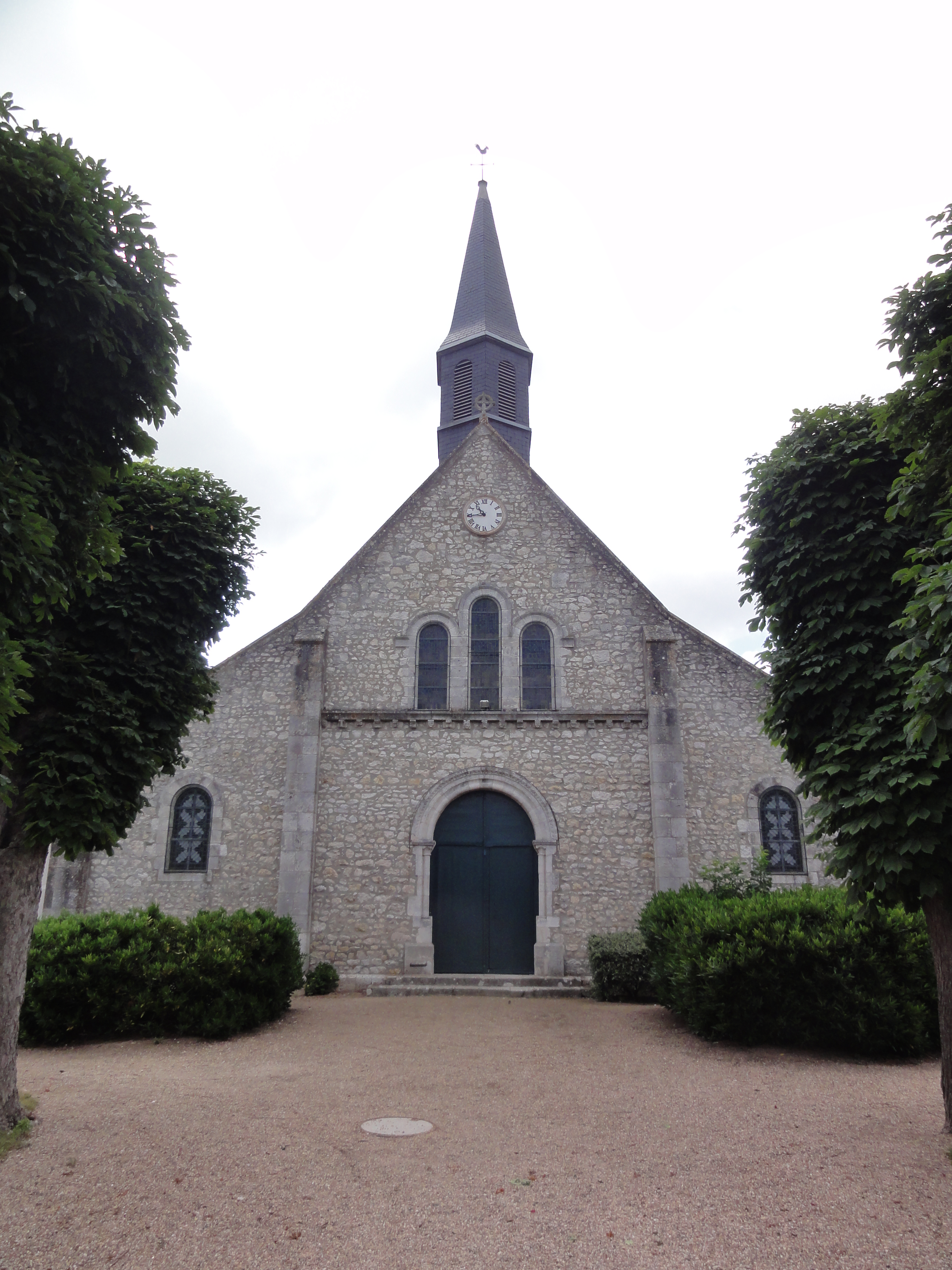 Eglise Saint-Hippolyte de Mareau-aux-Prés .